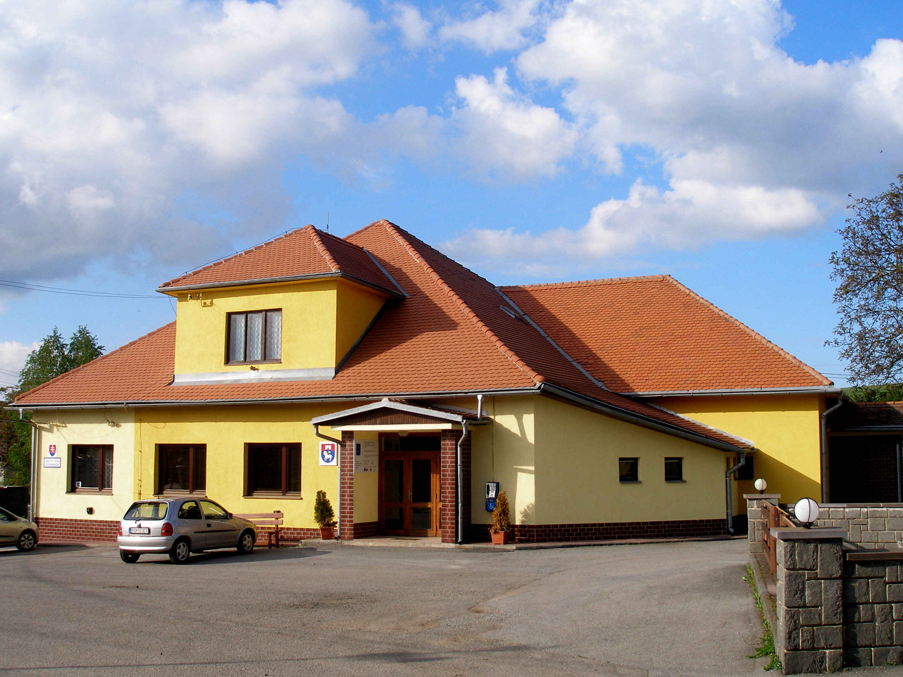 Obec Podhradík okres Prešov, budova obecného úradu.